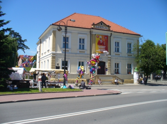 Sułkowice